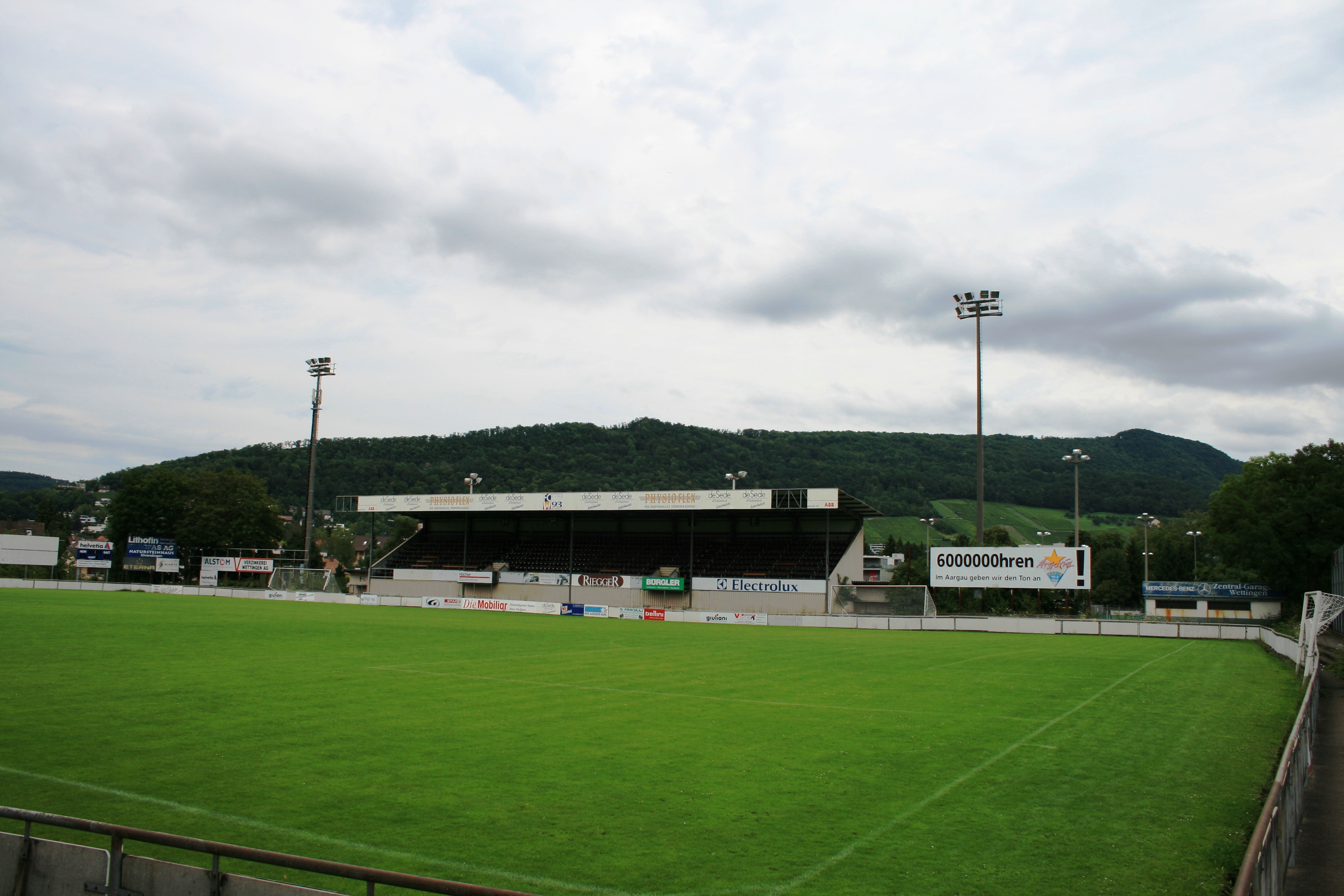 Stadion Altenburg, Wettingen, Schweiz